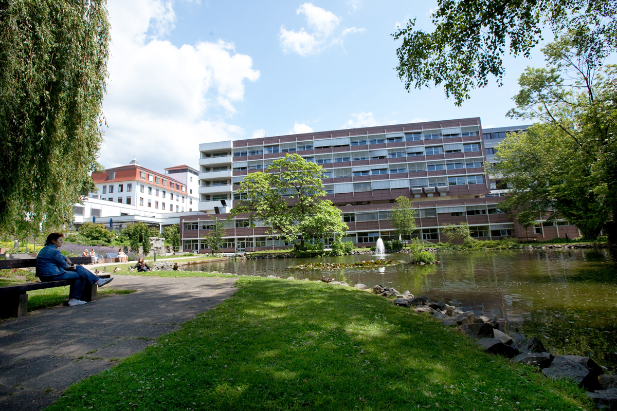 Das Bild zeigt die Main-Kinzig-Kliniken un Gelnhausen sowie den Park.